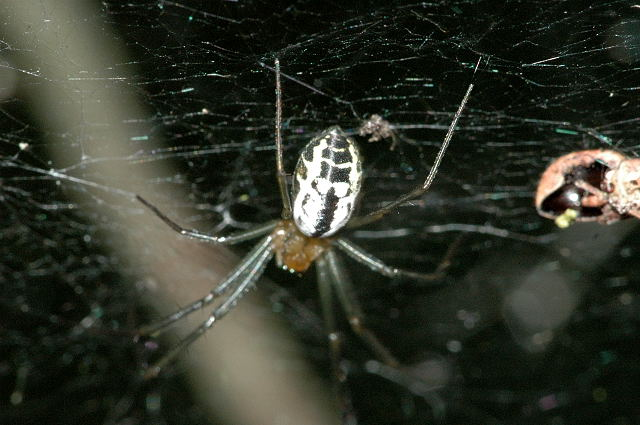 female Neriene emphana from Commanster, Belgian High Ardennes .